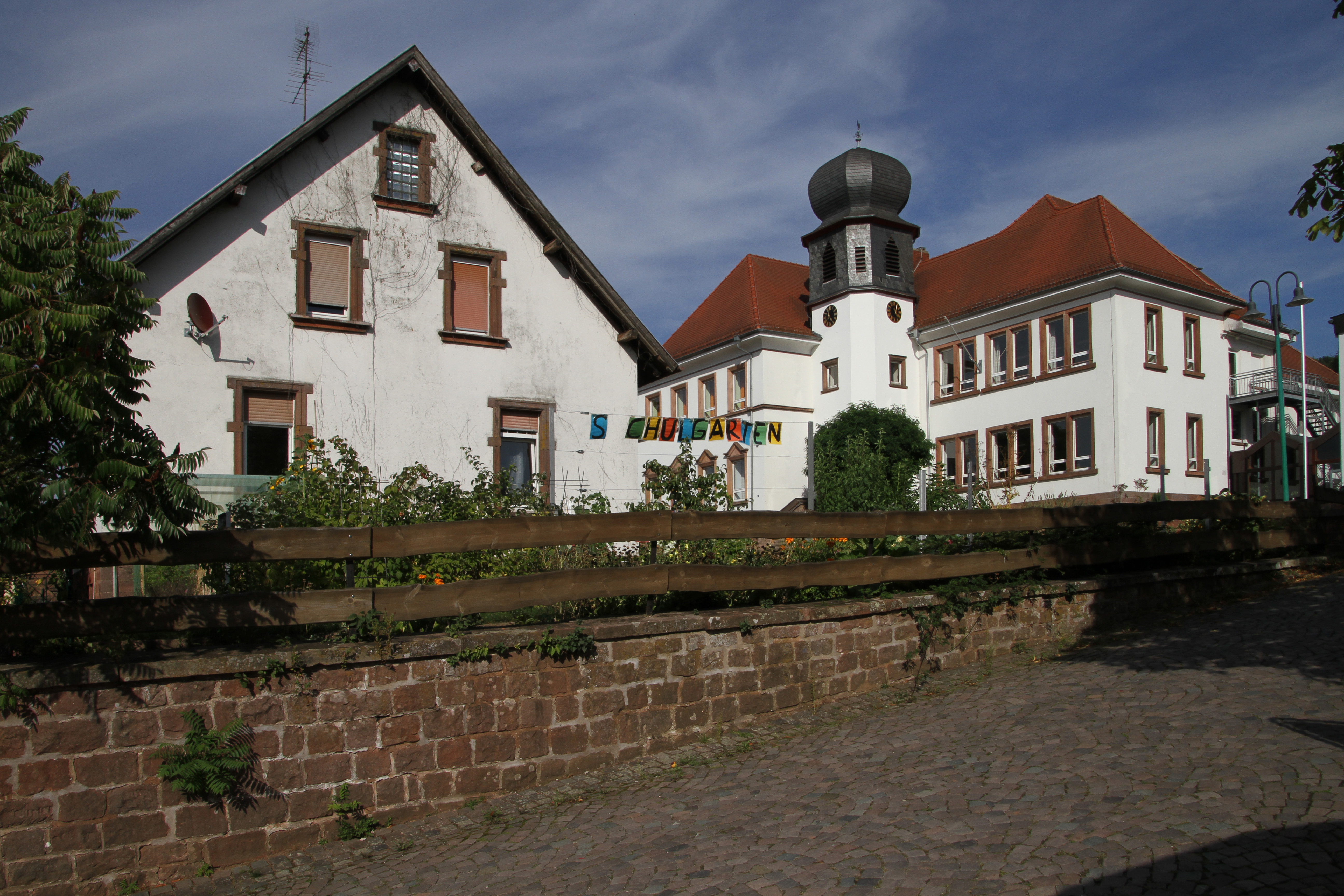 Schopp, Hauptstraße 11a/11b; Schule, zwei Walmdachbauten mit eingestelltem Zwiebelturm, 1904–23.